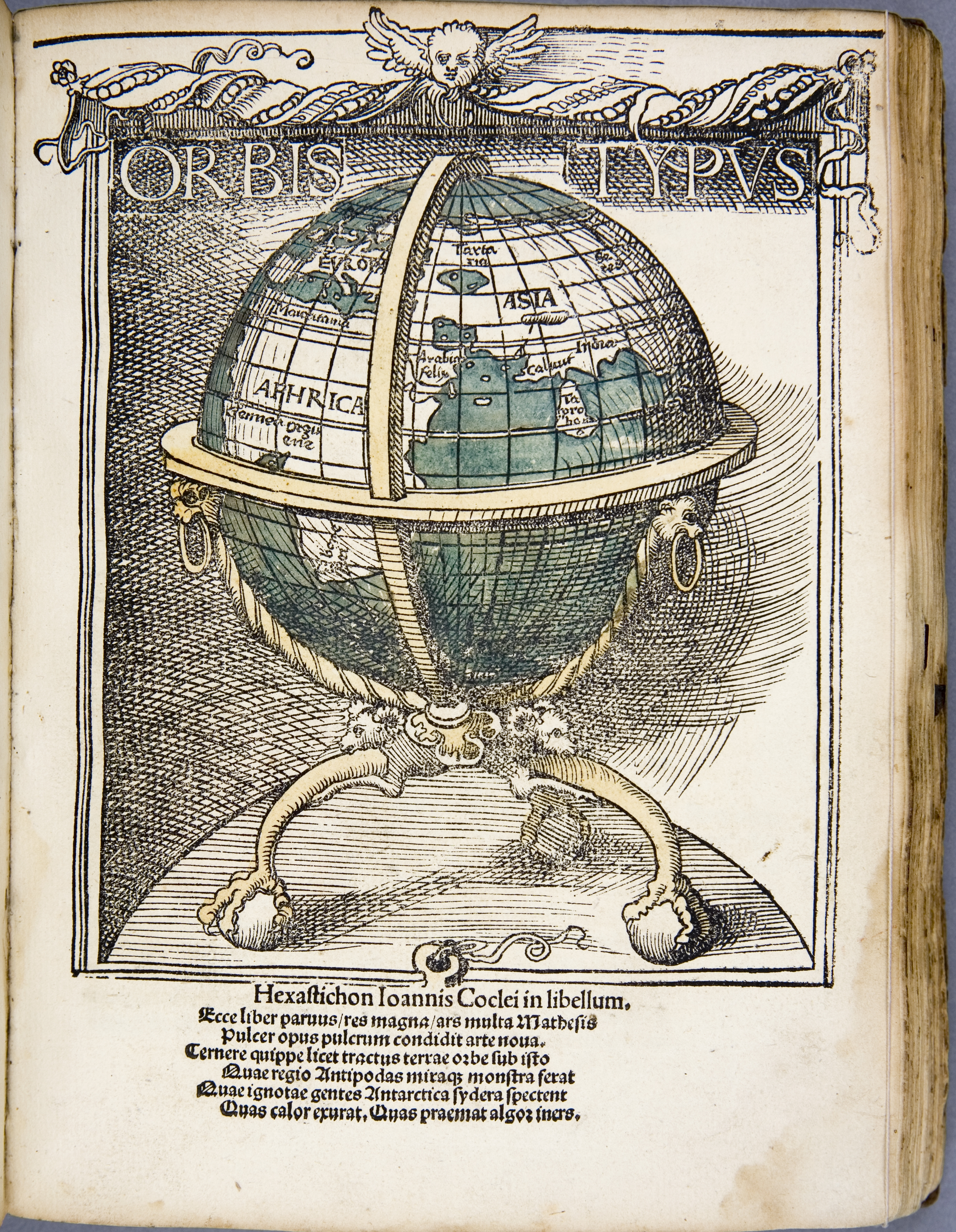 Orbis Typus. Holzschnitt, aus: Johann Schöner, Luculentissima quaedam terrae totius descriptio: cu multis utilissimis Cosmographiae iniciis. […], Nürnberg: Johann Stuchs, 1515. Stadtbibliothek Mainz, Stb Ink 155, Nr. 2